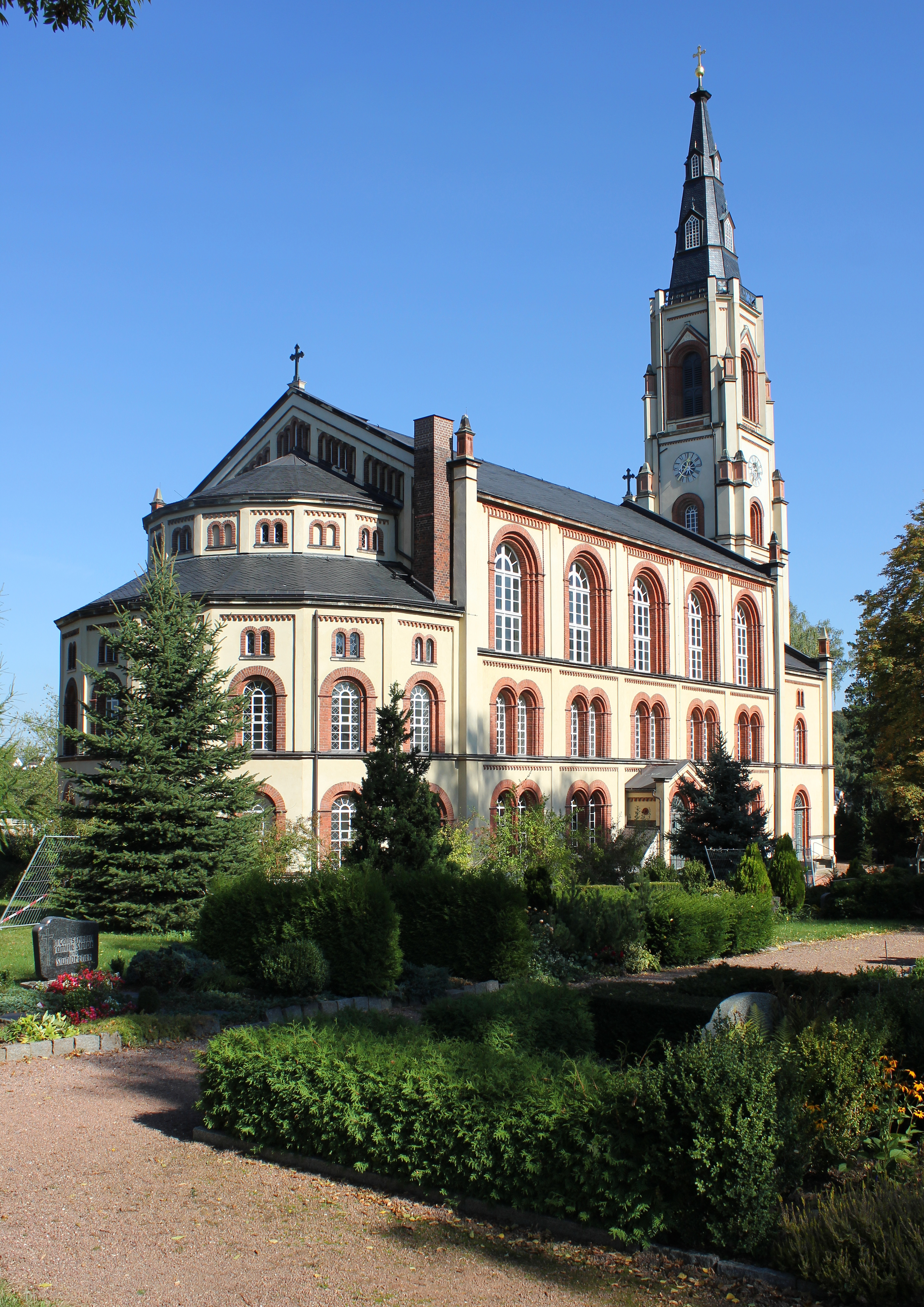 Die Marienkirche wurde 1862 bis 1865 in der Mitte des Ortes erbaut. Gersdorf. Sachsen.